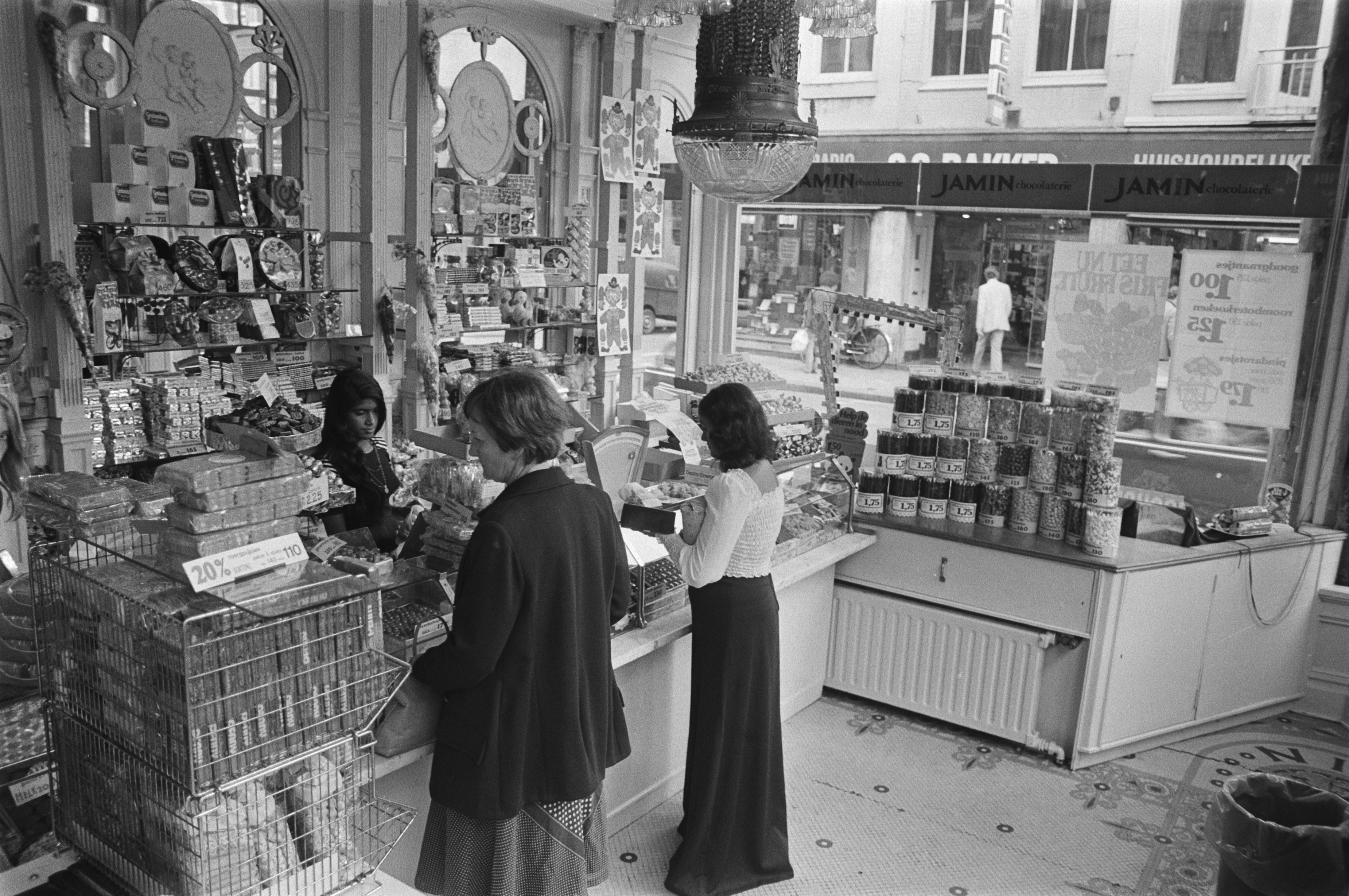 Collectie / Archief : Fotocollectie Anefo Reportage / Serie : [ onbekend ] Beschrijving : Interieur Jamin, opdracht Volkskrant Datum : 28 juli 1976 Trefwoorden : Interieur, winkels Persoonsnaam : Jamin Instellingsnaam : Volkskrant Fotograaf : Bogaerts, Rob / Anefo Auteursrechthebbende : Nationaal Archief Materiaalsoort : Negatief (zwart/wit) Nummer archiefinventaris : bekijk toegang 2.24.01.05 Bestanddeelnummer : 928-7093